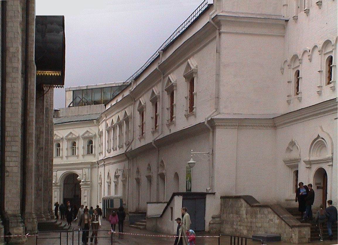 palais du Patriarche (Kremlin de Moscou)